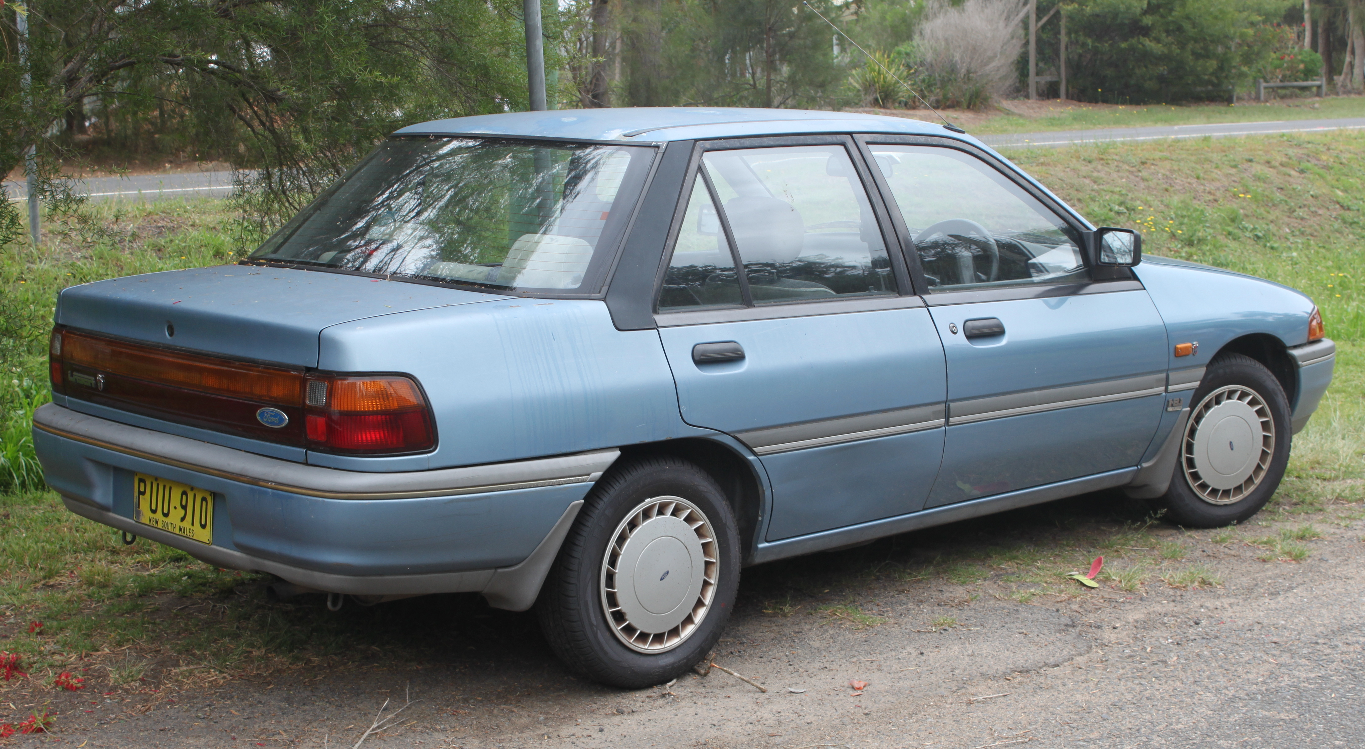 Ford Laser KF Ghia